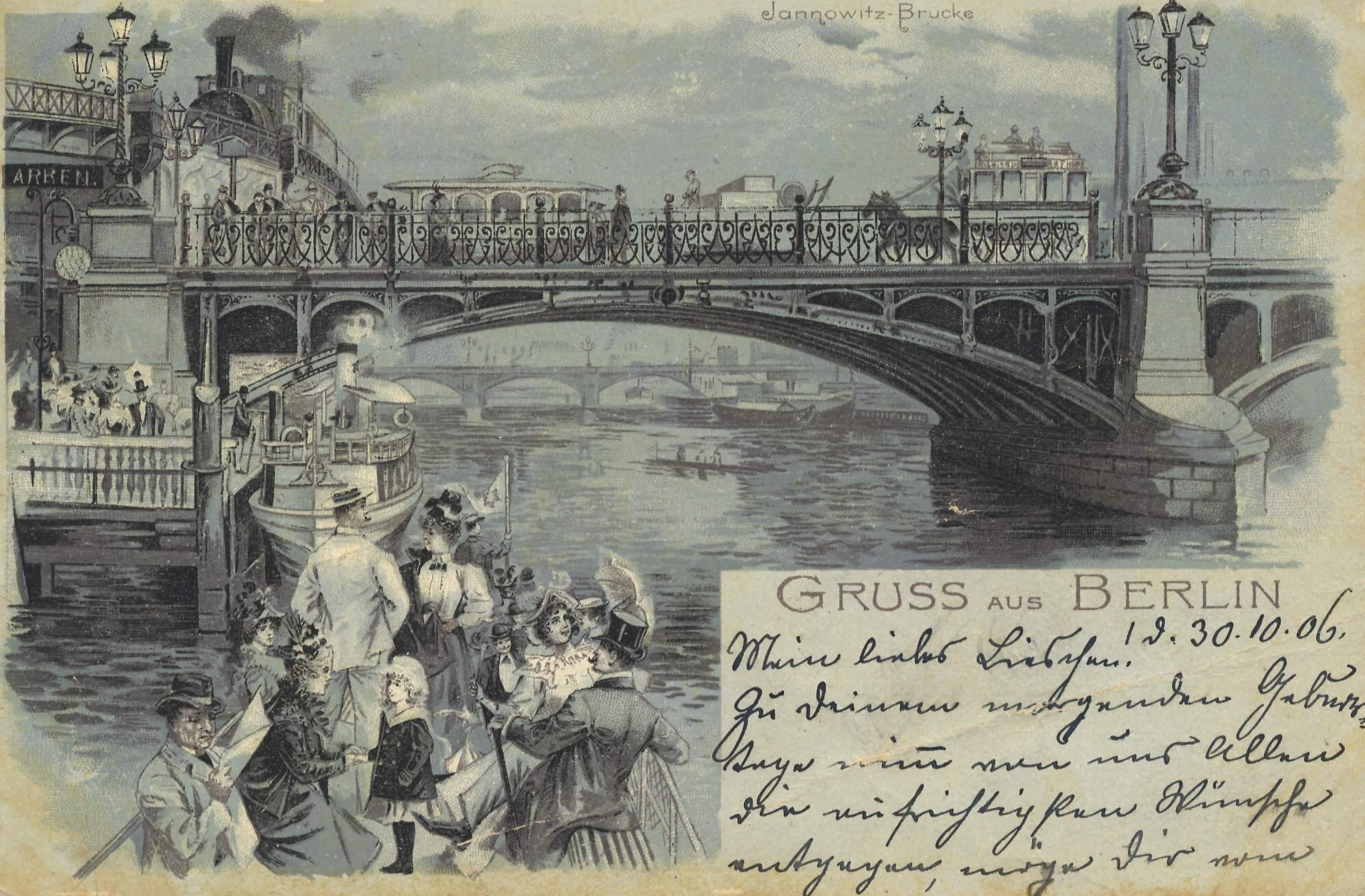 Jannowitzbrücke